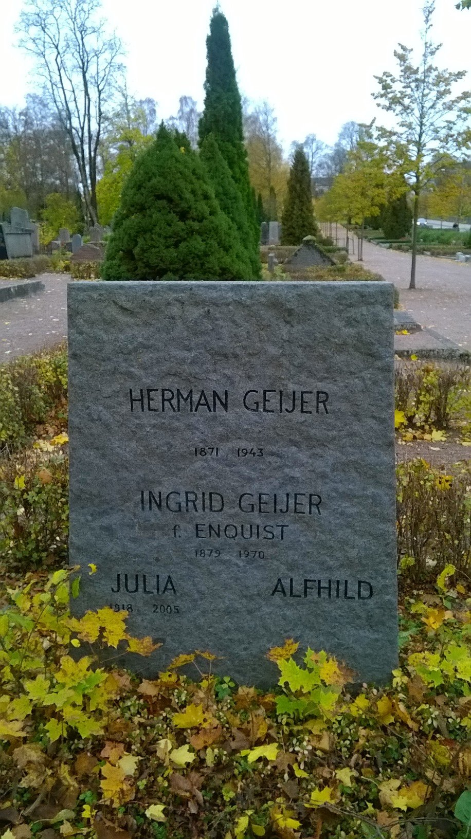 Dialektforskaren professor Herman Geijers gravsten på Uppsala gamla kyrkogård.